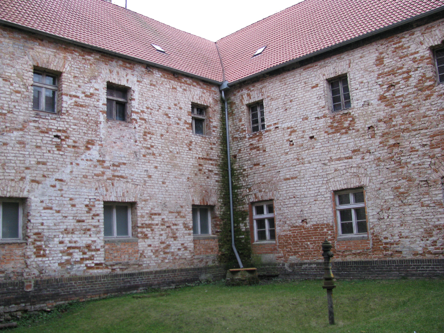 Wirydarz klasztoru w Szamotulach